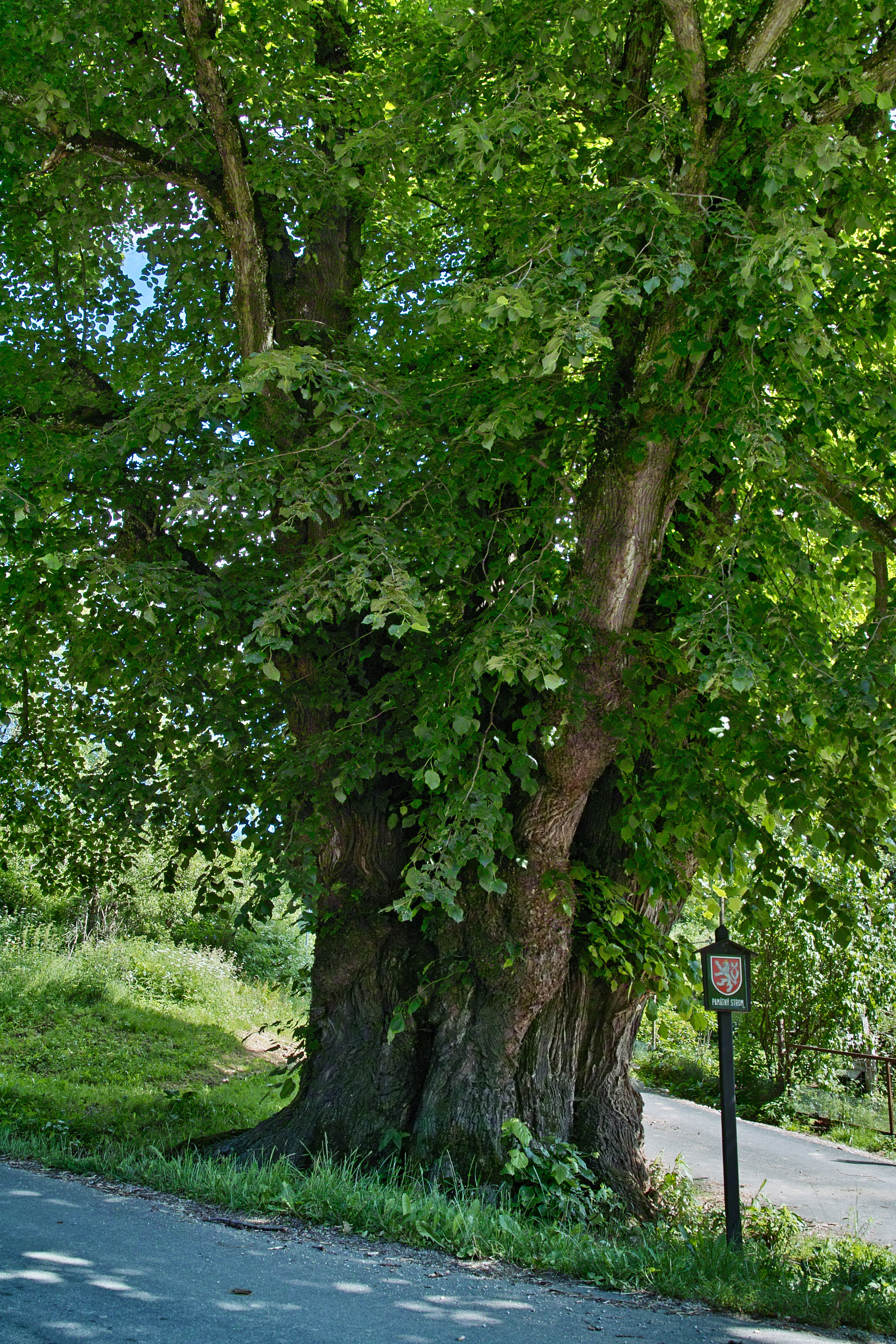 500 let stará lípa u Machova Mlýna nedaleko Šumavských Hoštic, kmen